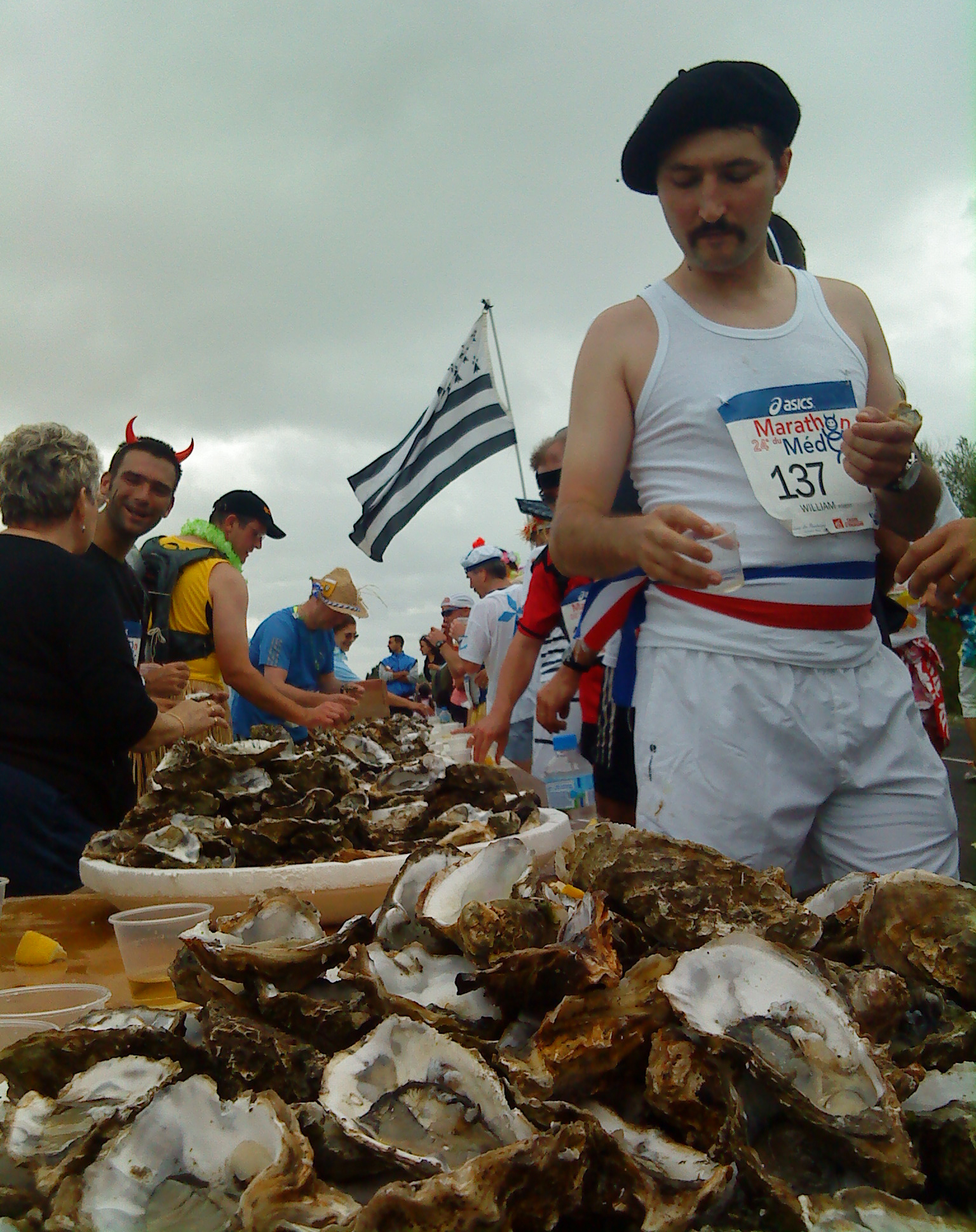 Oysters, kilometre 39, Marathon du Médoc.